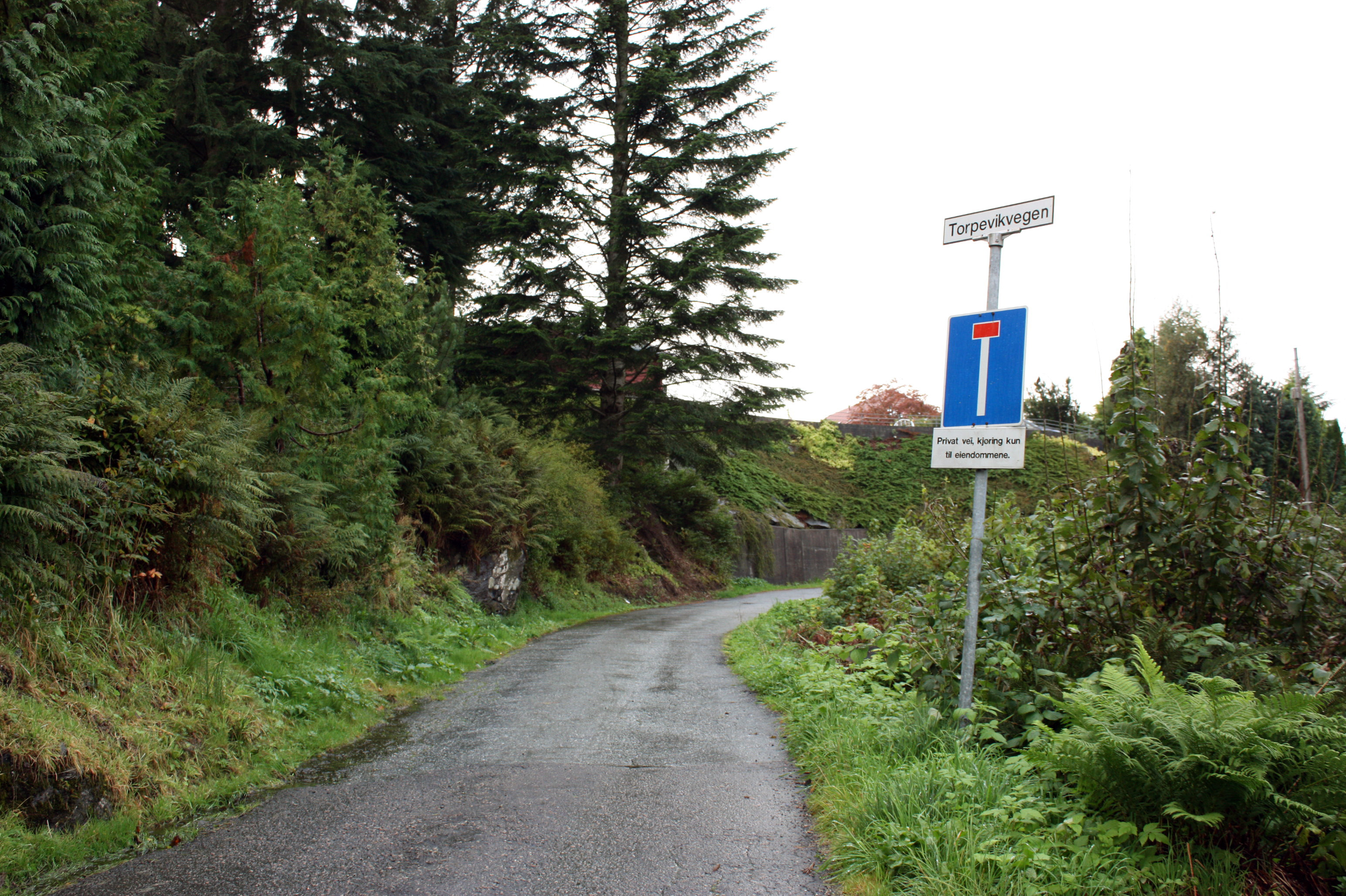 Torpeviken, Fana, Bergen.